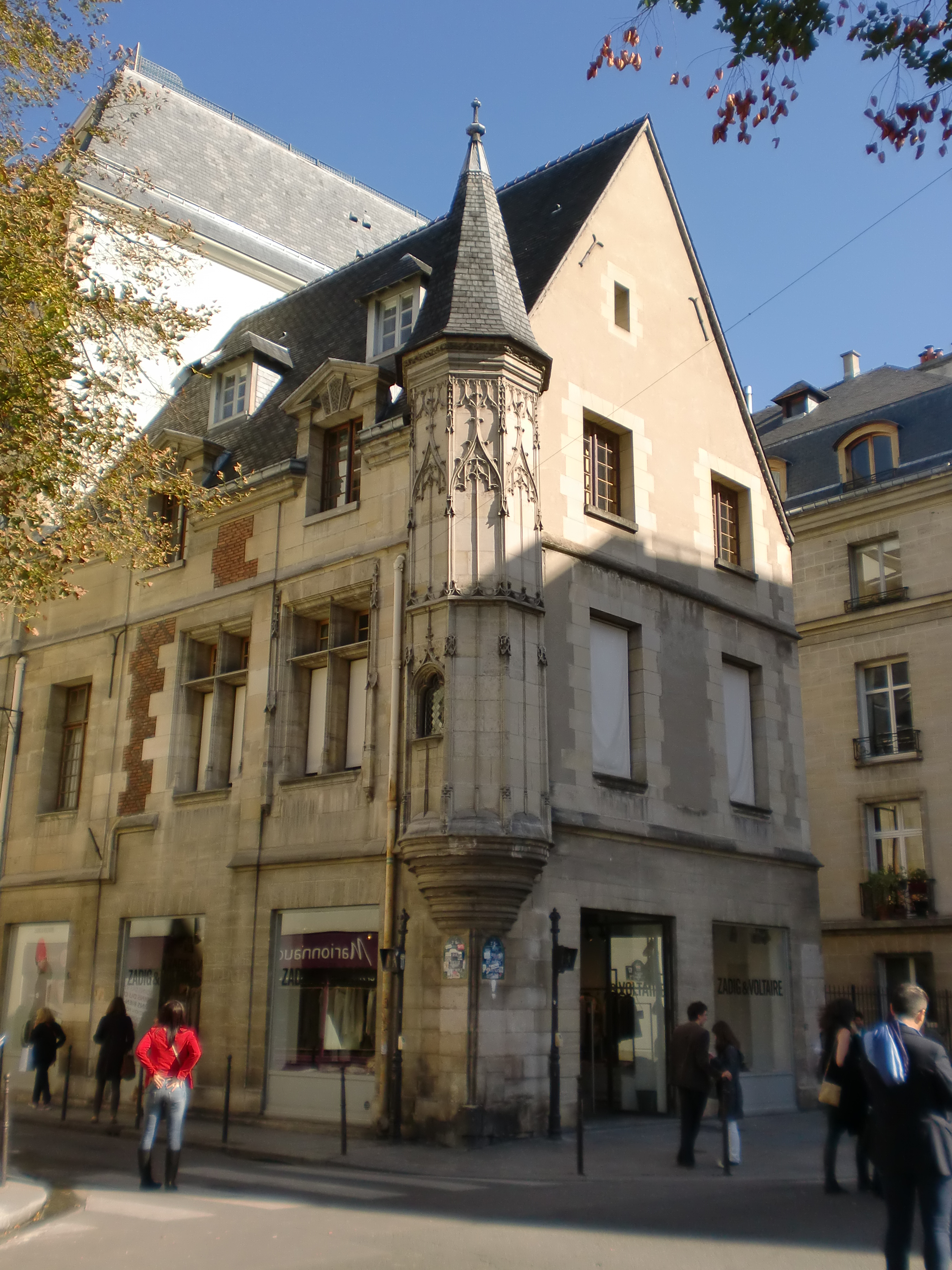 Hôtel Hérouet, 54 rue Vieille du Temple, 42 rue des Francs-Bourgeois 75003 Paris. .